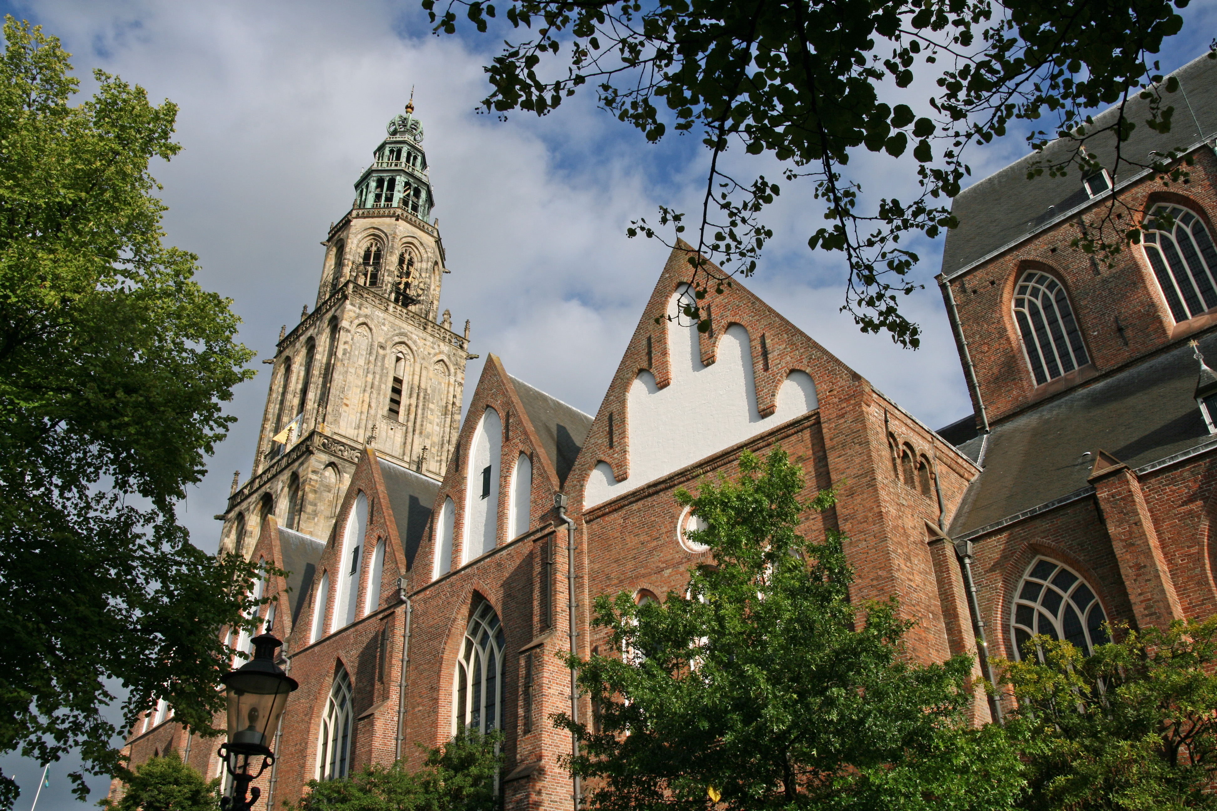 Martinitoren en -kerk